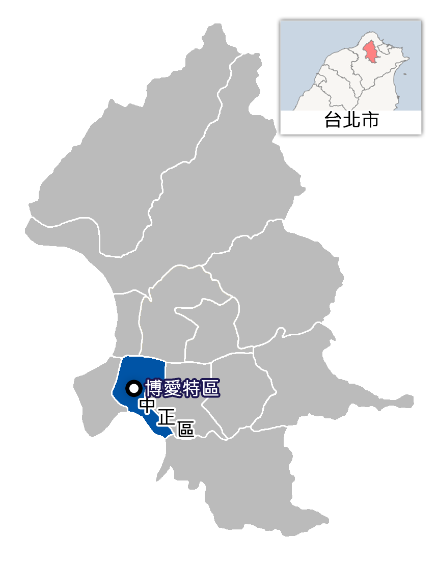 中華民國博愛特區位置示意